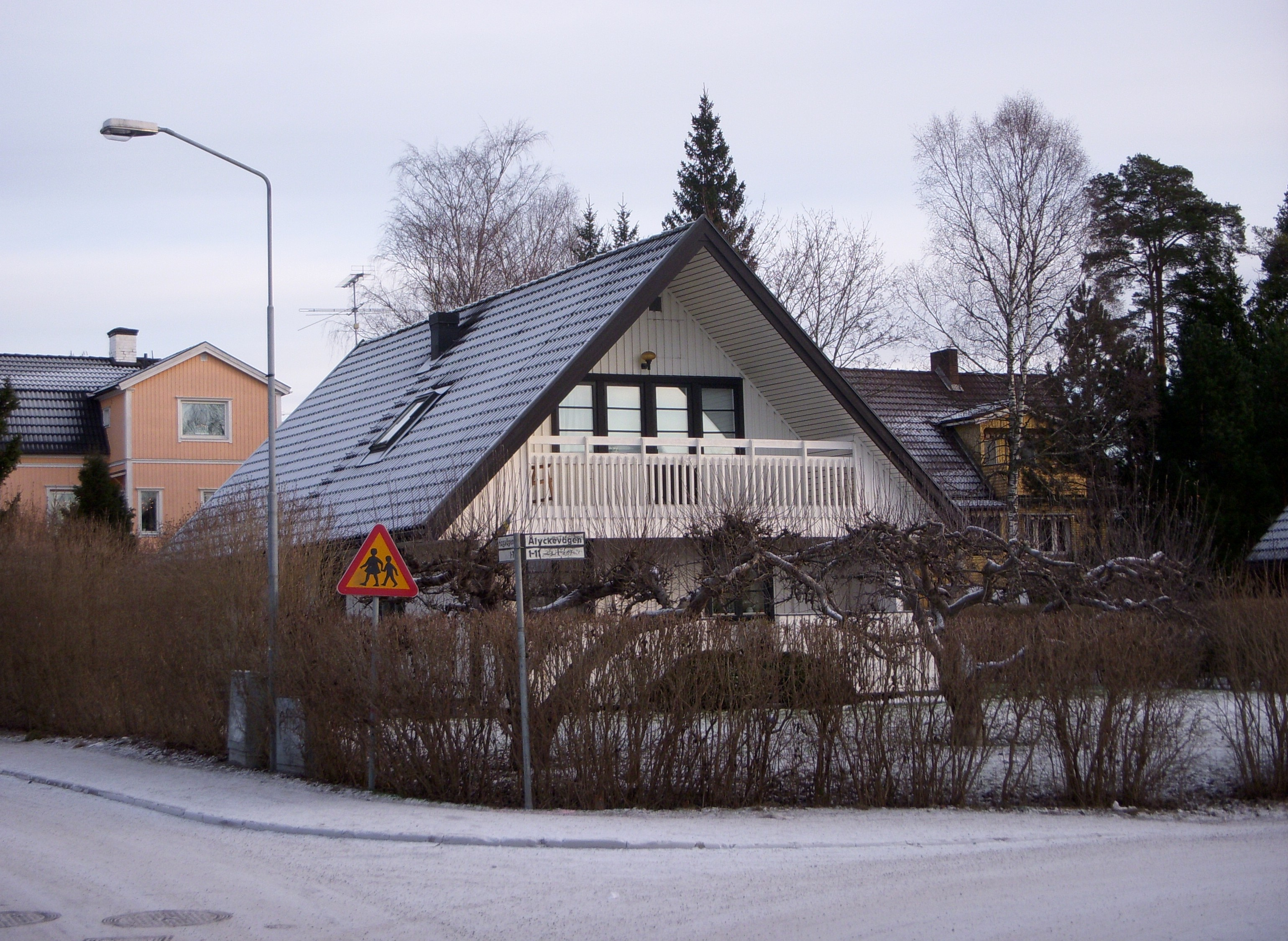 Så kallad "joddlarbalkong" på en 1970-tals villa i Segeltorp